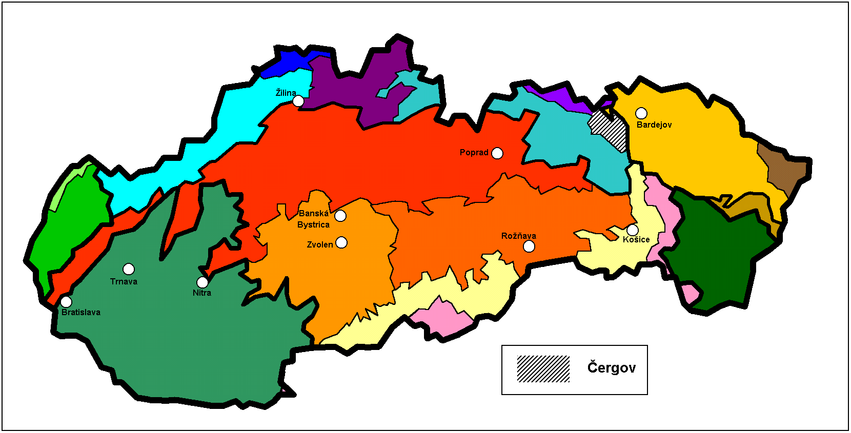 Cergov